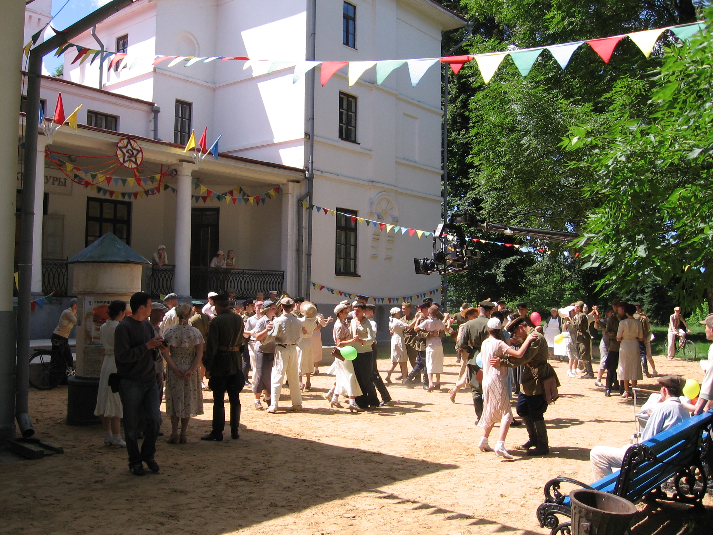 Беларуская (тарашкевіца): Пружанскі палацык. Здымкі фільма "Берасьцейская крэпасьць" This is a photo of Belarusian heritage monument. Reference number: 112Г000585 ( WLM)